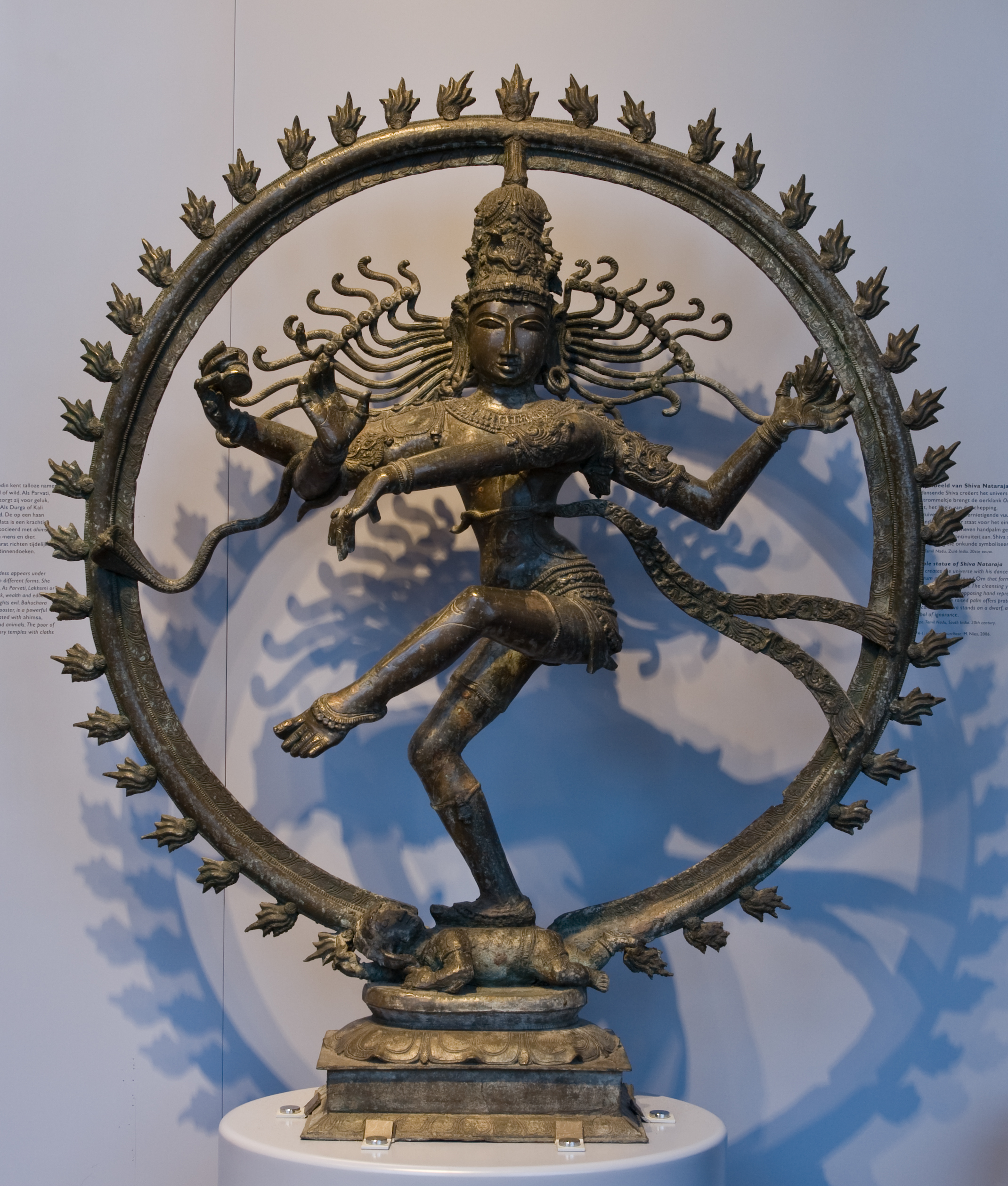 Shiva Nataraja (6274-1) Tropenmuseum - Shiva Nataraja